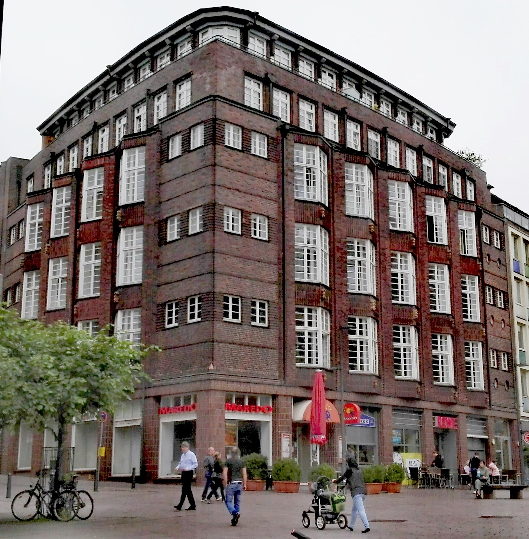 6-geschossiger expressionistischer Klinkerbau – Baujahr 1928–1930 – mit betonter Vertikalgliederung. Bezeichnung und Umfang des Denkmalschutzes: Äußeres des Gebäudes, insbesondere die Fassade zur Sand- und Schmiedestraße. Denkmalliste Nr: 965 Einstiger Warenhaus-Neubau des Konsumvereins (Kaufhaus am Klingenberg) für Lübeck und Umgegend e. G. m. b. H. aus den Jahren 1928–1930 in der Sandstraße 24–28.This is a photograph of an architectural monument.It is on the list of cultural monuments of Lübeck